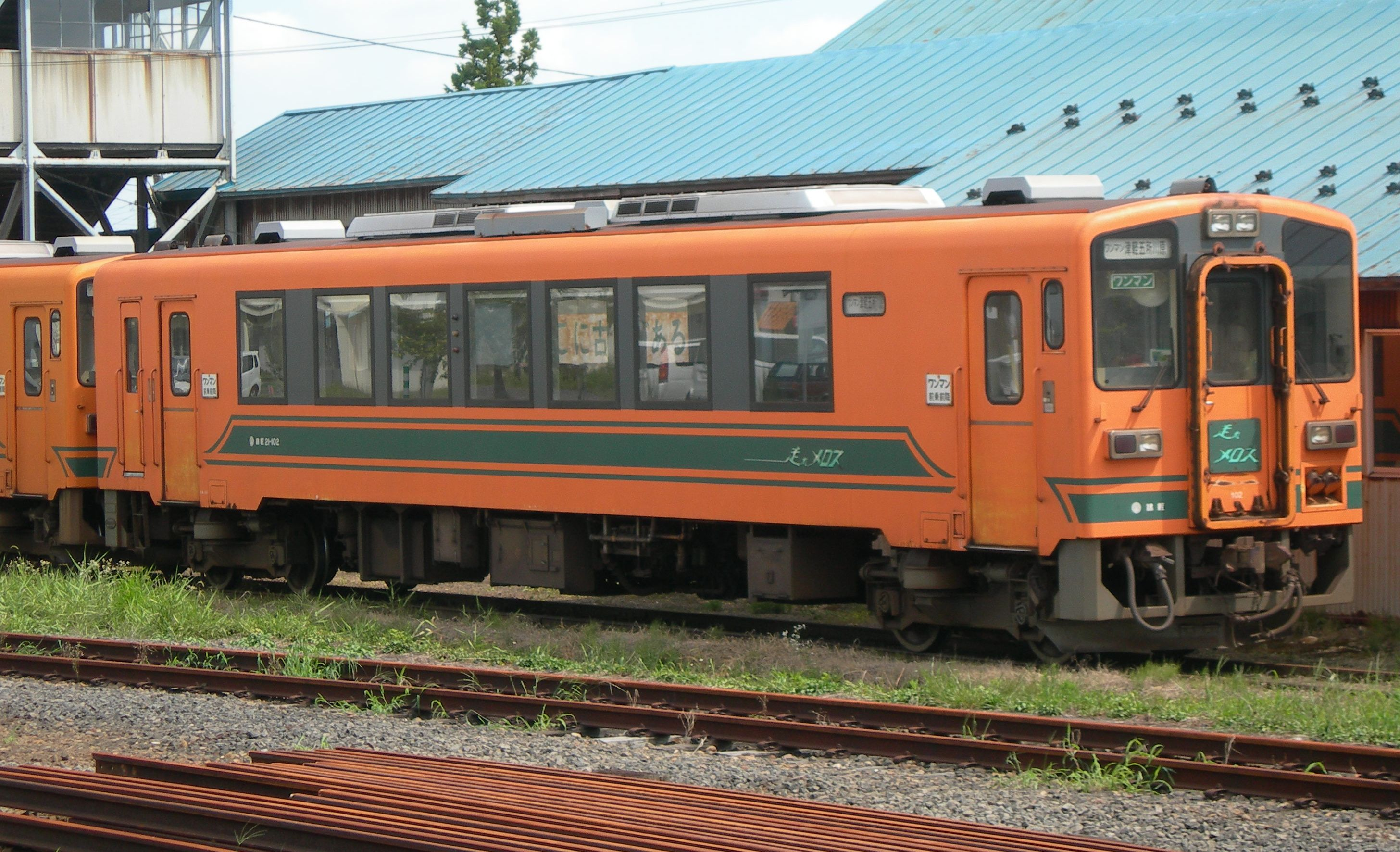 津軽鉄道・津軽21形気動車